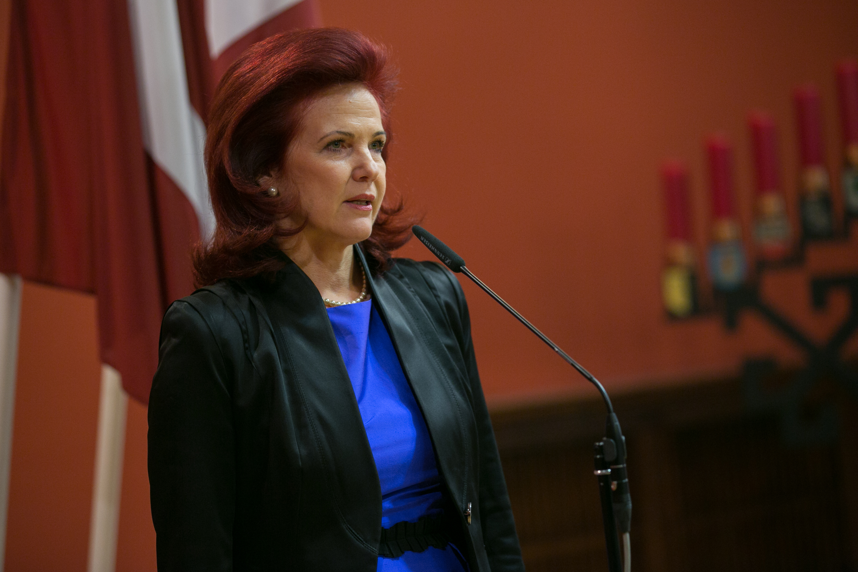 2014.gada 27.februāris. Saeimas priekšsēdētāja Solvita Āboltiņa tiekas ar Latvijas olimpisko komandu XXII Ziemas olimpiskajās spēlēs Sočos. Foto: Ernests Dinka, Saeimas Kanceleja Izmantošanas noteikumi: saeima.lv/lv/autortiesibas